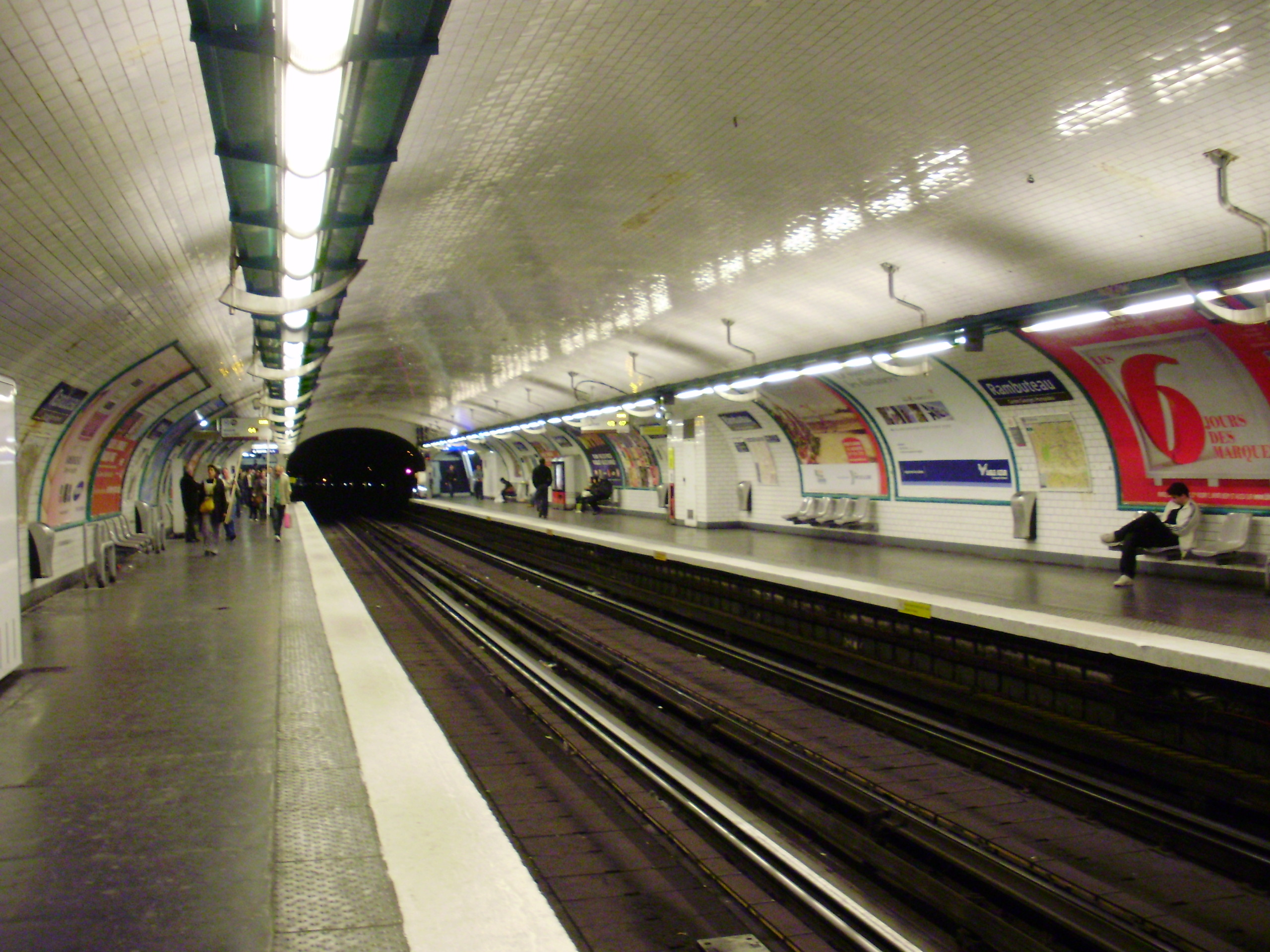 Quais (vue vers Châtelet) de la station « Rambuteau » du métro de Paris